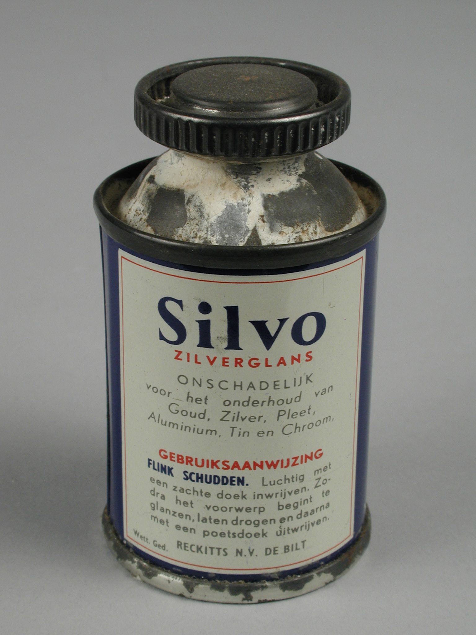 Objectgegevens Titel: Busje Silvo zilverglans Beschrijving: Op fles gelijkende blikverpakking voor zilverpoets. Cilindrisch, schouder, relatief grote ronde schroefsluiting. Wand deels blauw op wit. Voorzijde: merknaam in cartouche, twee-armige kandelaar met rode kaarsjes. Trefwoorden: blik, productverpakking, houder Opschrift / merk: Transfer voorzijde: "Silvo / zilverglans / onschadelijk / voor het onderhoud van / Goud, Zilver, Pleet, / Aluminium, Tin en Chroom / Gebruiksaanwijzing / ... / RECKITTS N.V. DE BILT". Vervaardiger: fabrikant: Reckitts n.v. Plaats vervaardiging: Nederland, De Bilt? Datering: 1960 - 1970 Technieken: blik, vertind, geperst, gefelst, transfer Materiaal: ijzer, tin, verf Afmetingen: (cm) hg 7,0 / dm 4,0 Associatie: reclame, verpakken, poetsmiddel Vorm & decoratie: verpakking, verlichting Inventarisnr: Museum Rotterdam 66891